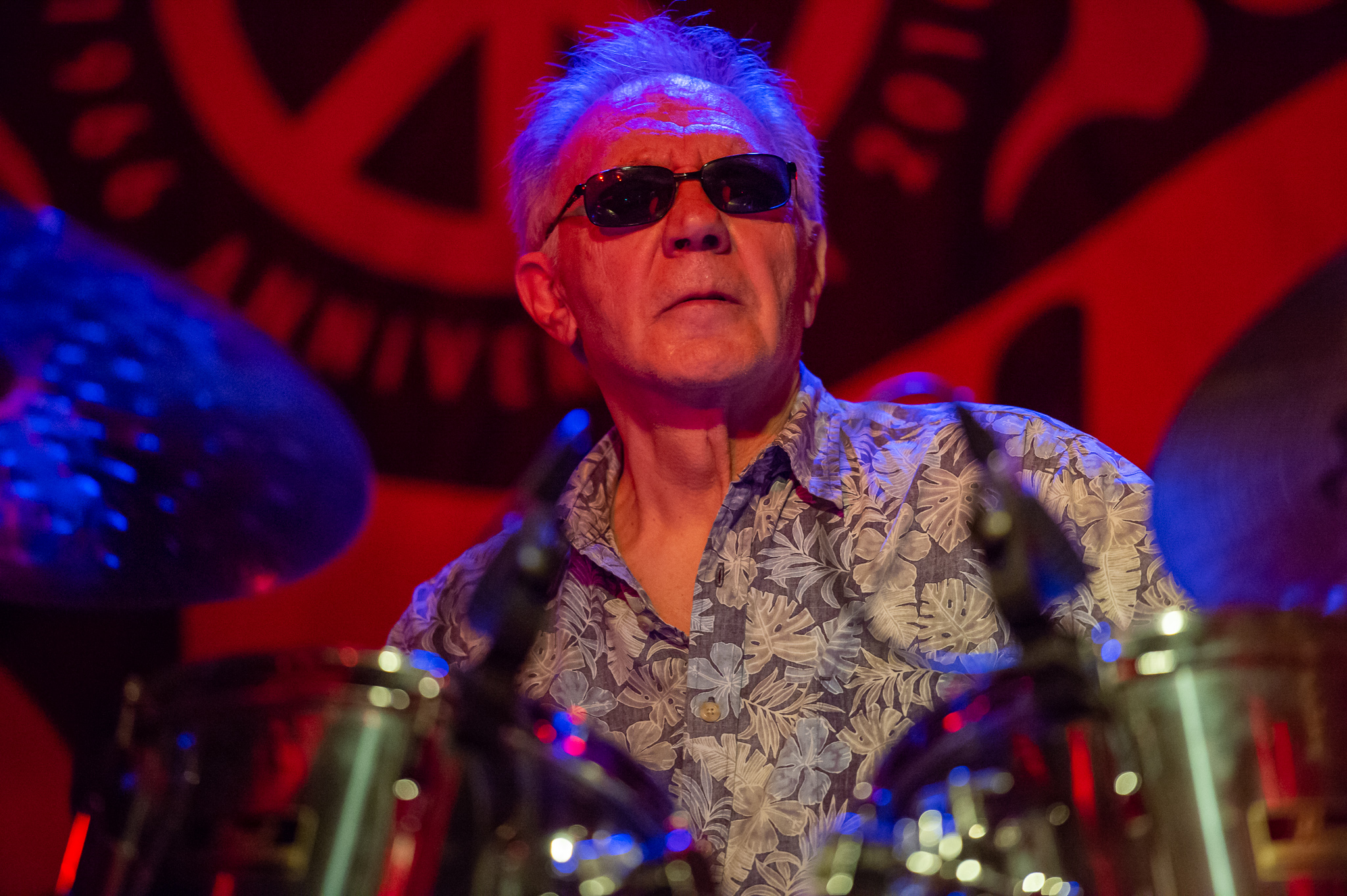 Adolfo „Fito“ de la Parra,Canned Heat,Concertbüro Franken,Konzert,Livekonzert,Livemusik,Musik,Serenadenhof